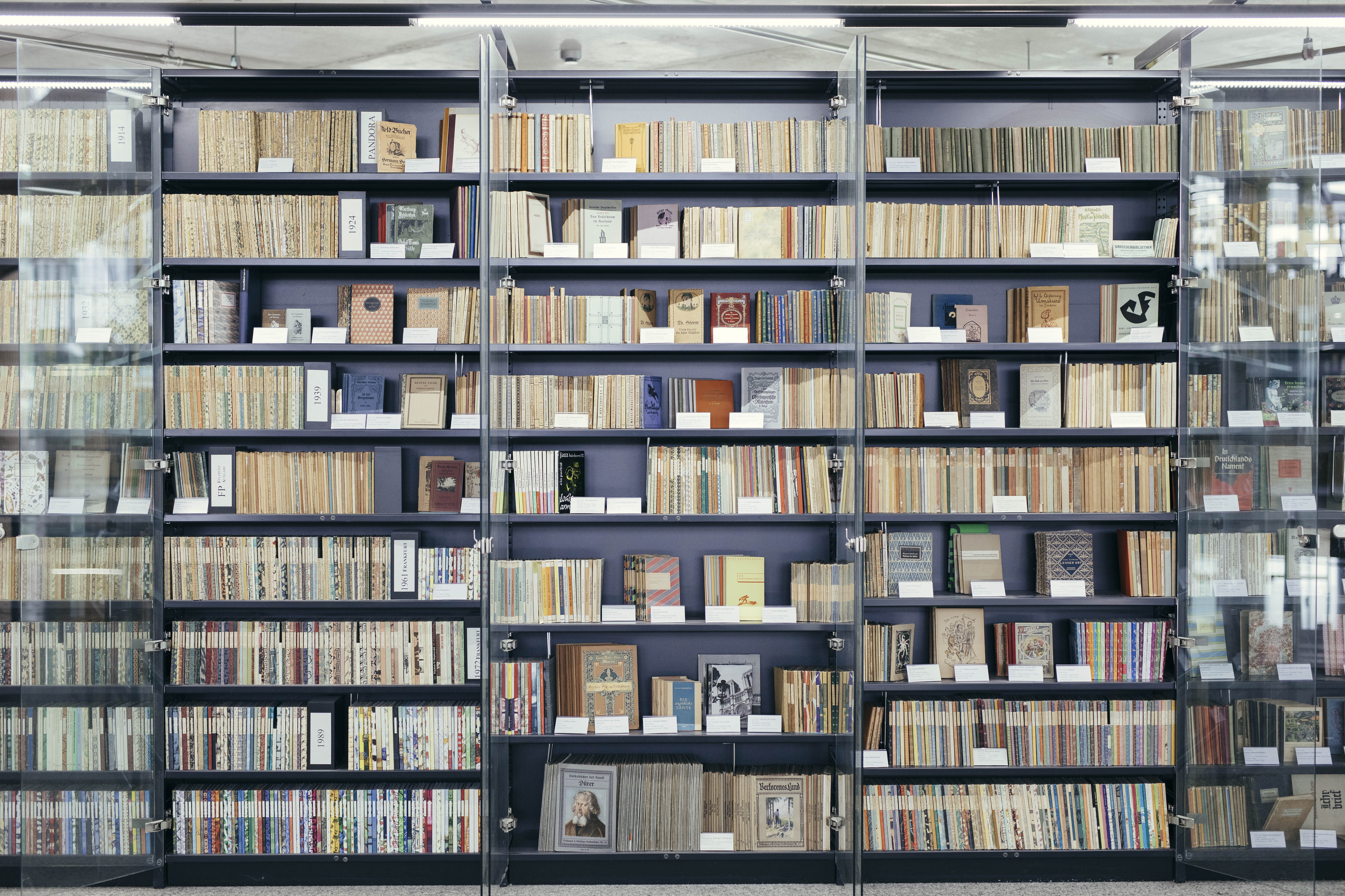 Ein Regal der Ute und Wolfram Neumann-Stifung.